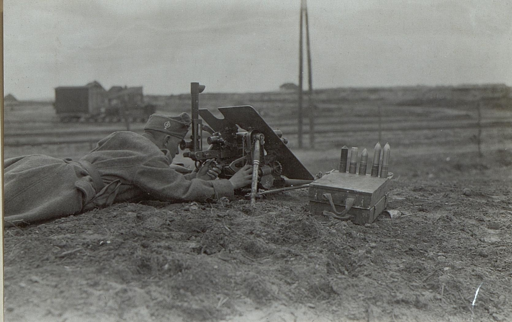 Minenwerferkurs. Infanteriegeschütz, Sporn vorne.10.Mai 1917.